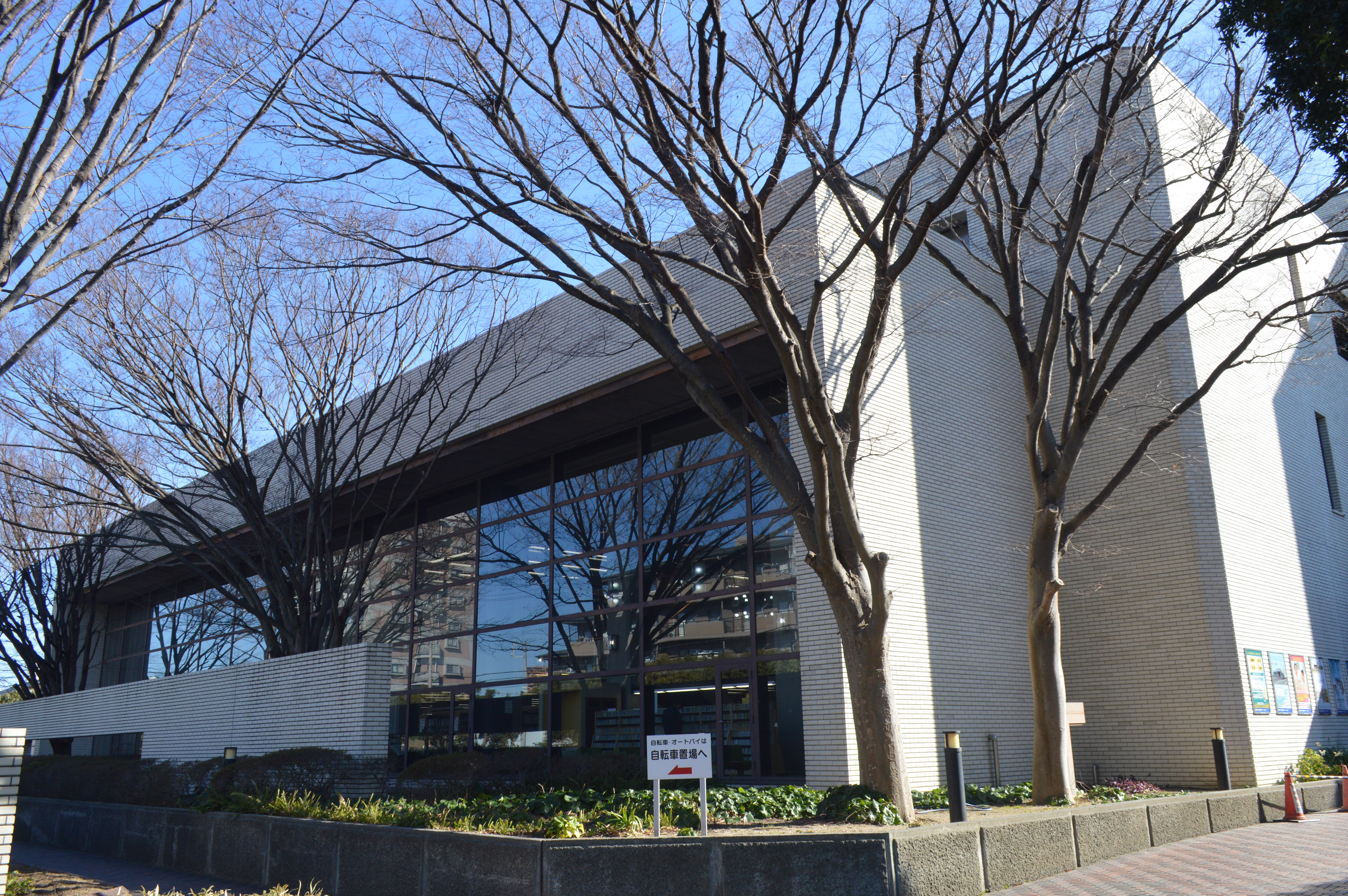 愛知県豊橋市にある豊橋市中央図書館。